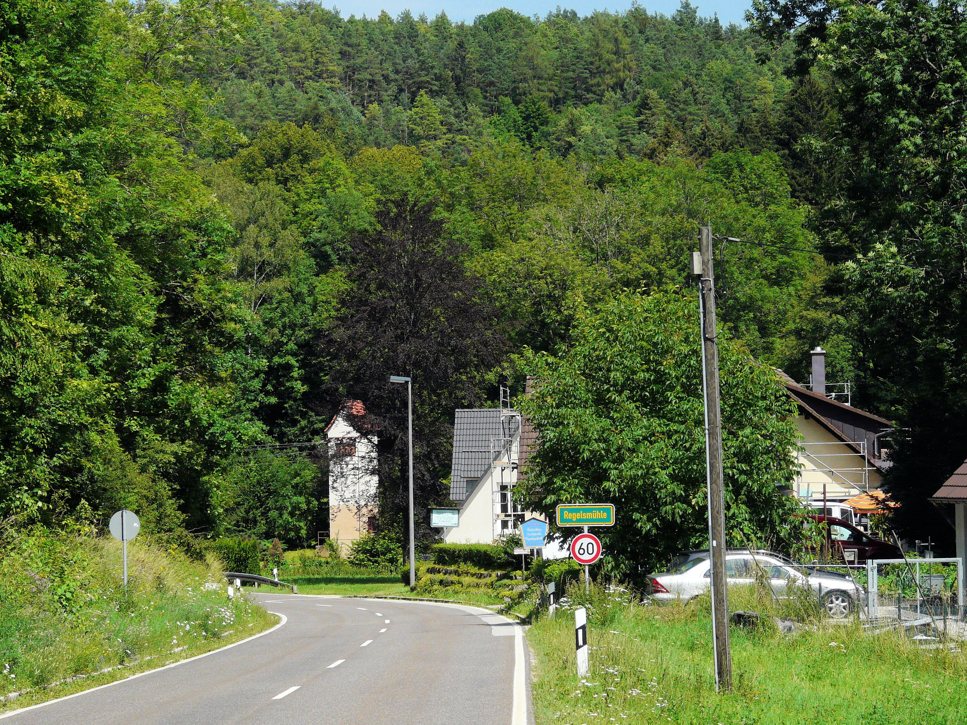 Regelsmühle, Gemeinde Alfeld in Mittelfranken